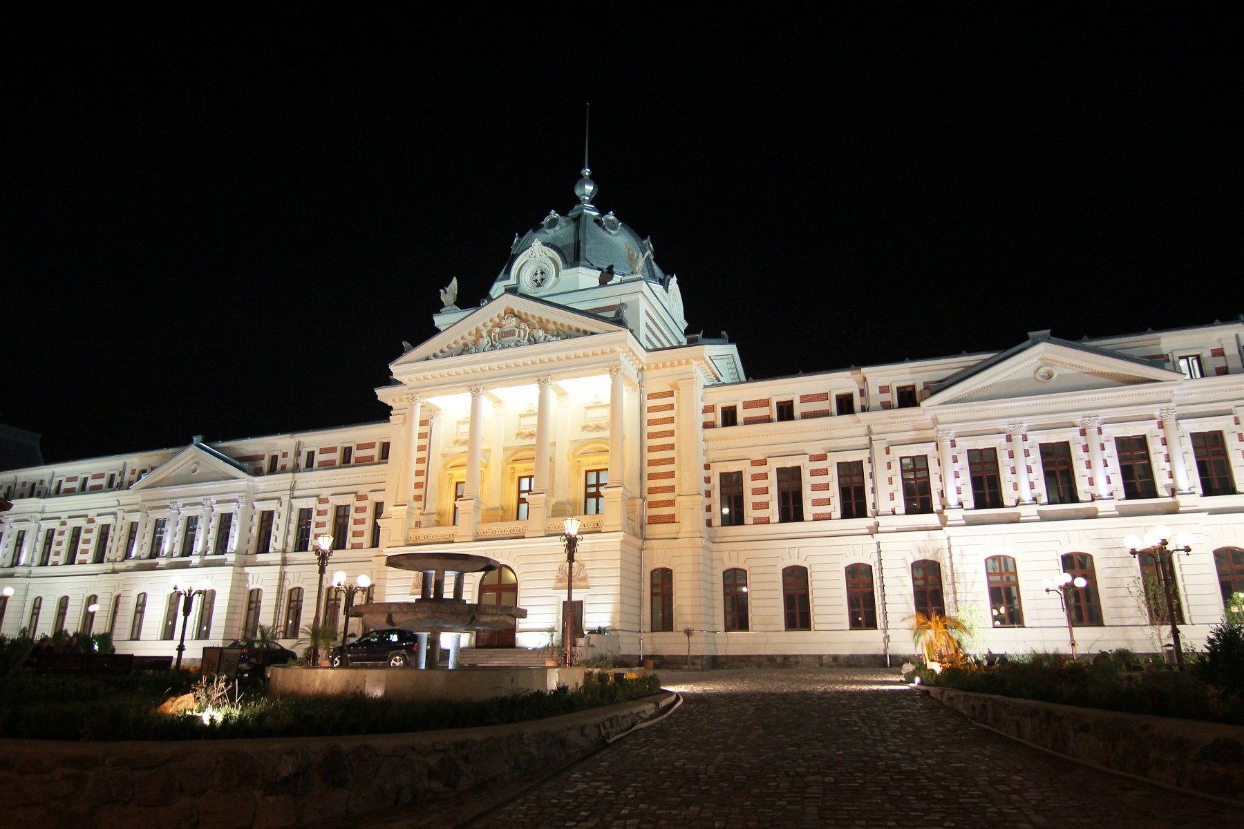 Spitalul Colțea